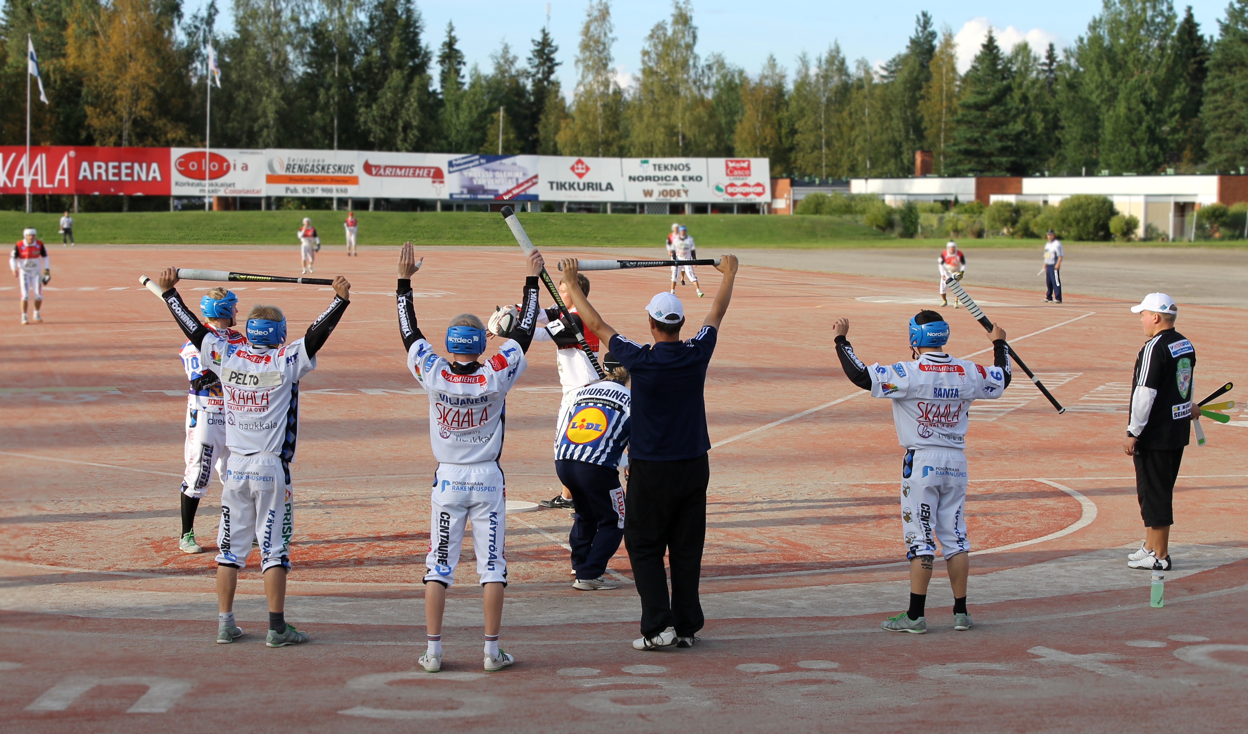 Nurmon Jymy pelaajia Superpesiskarsintaottelussa Seinäjokea vastaan 25. elokuuta 2012